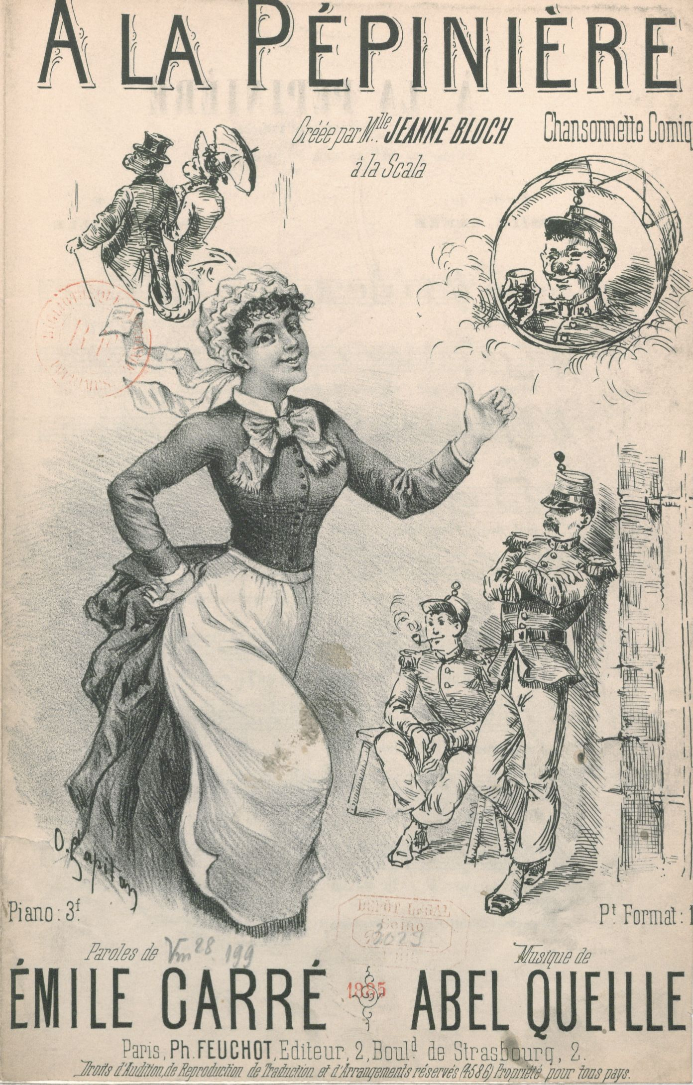 Couverture d'un petit format d'une chanson d’Émile Carré.